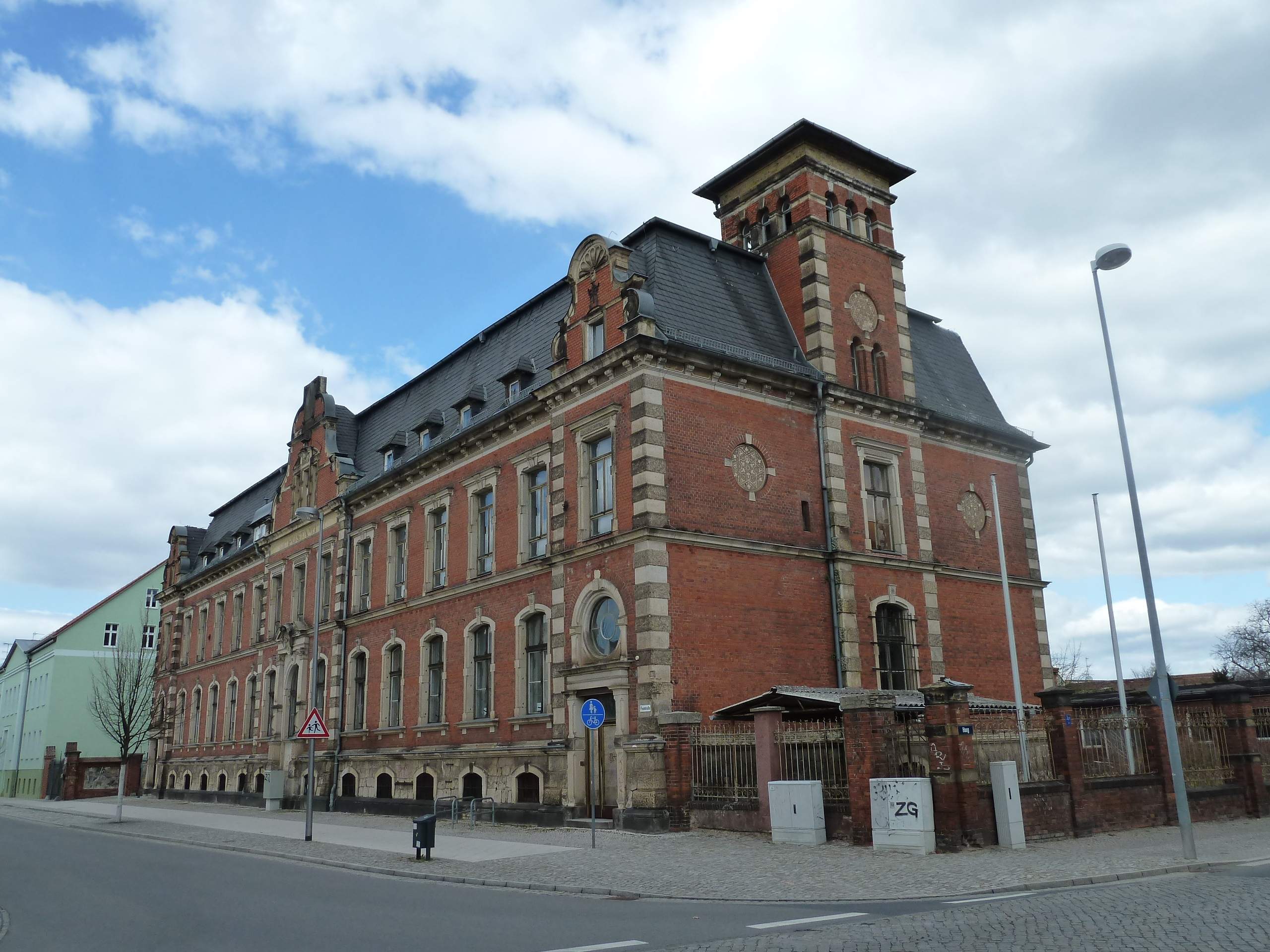 Luckenwalde, ehemalige Post, Kulturdenkmal